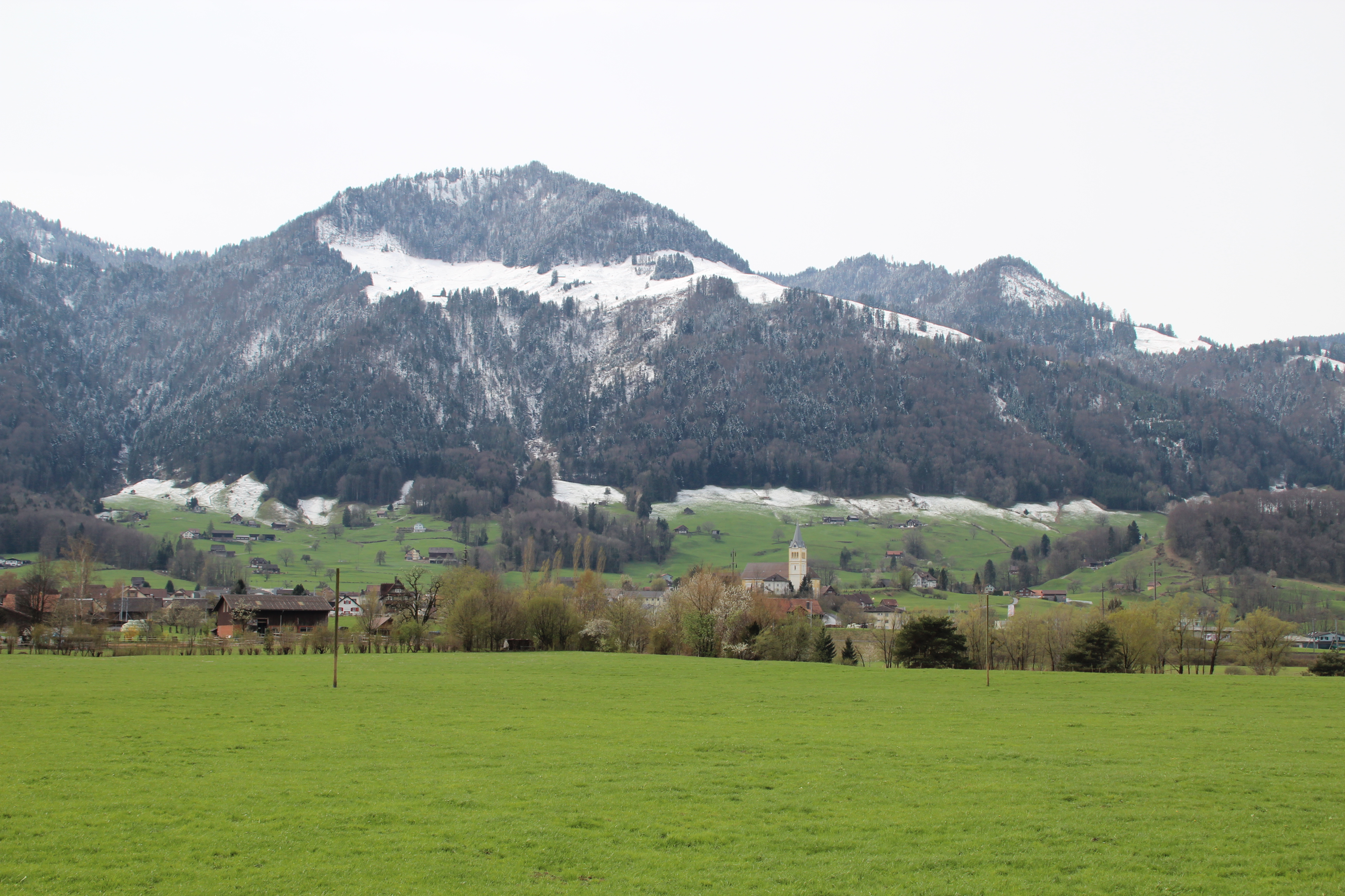 Reichenburg